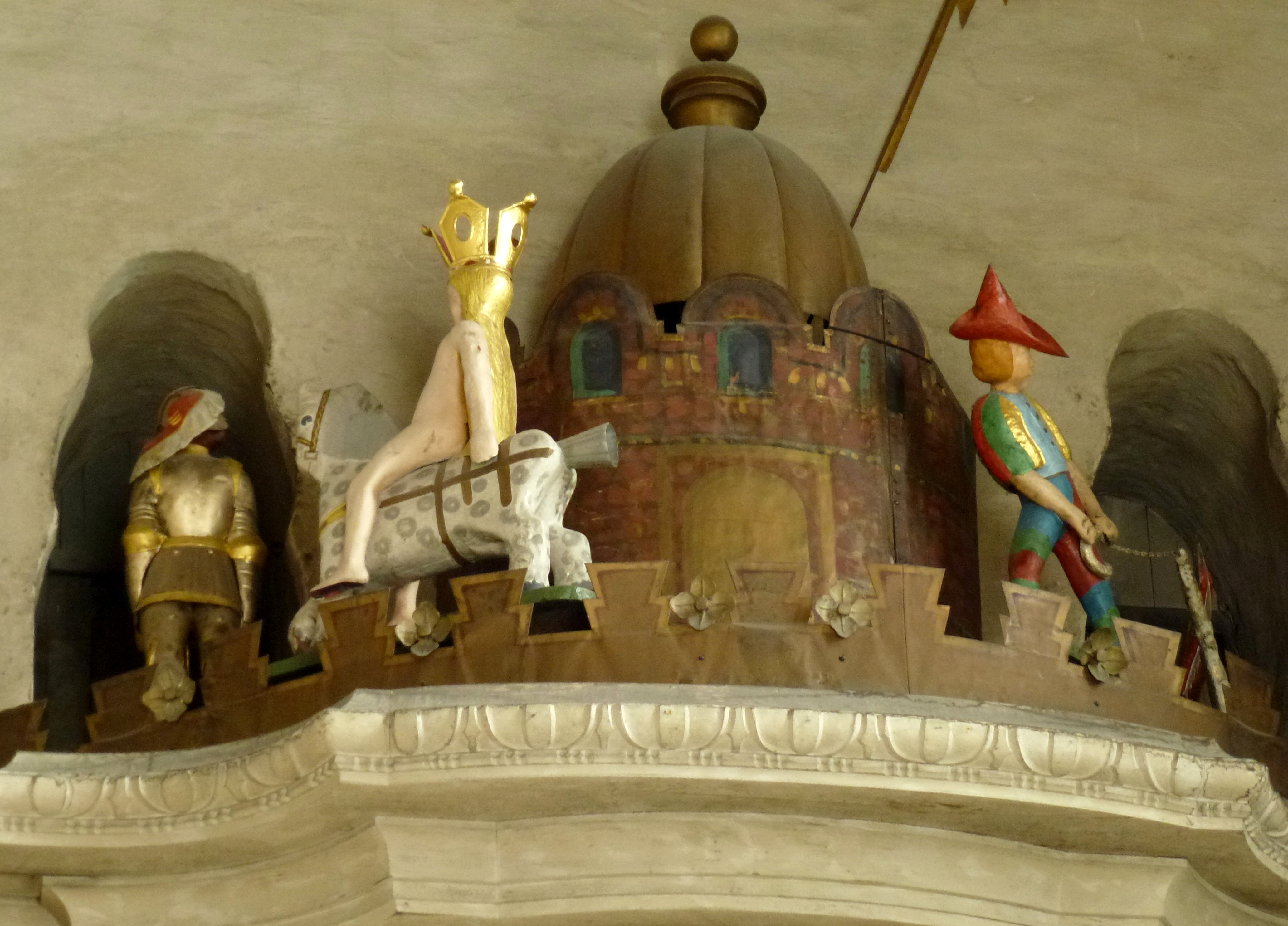 De hundrades valv och Sankt Örjanspelet